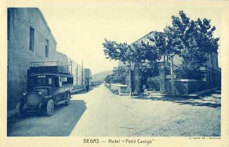 Hotel Colonies Petit Canigo